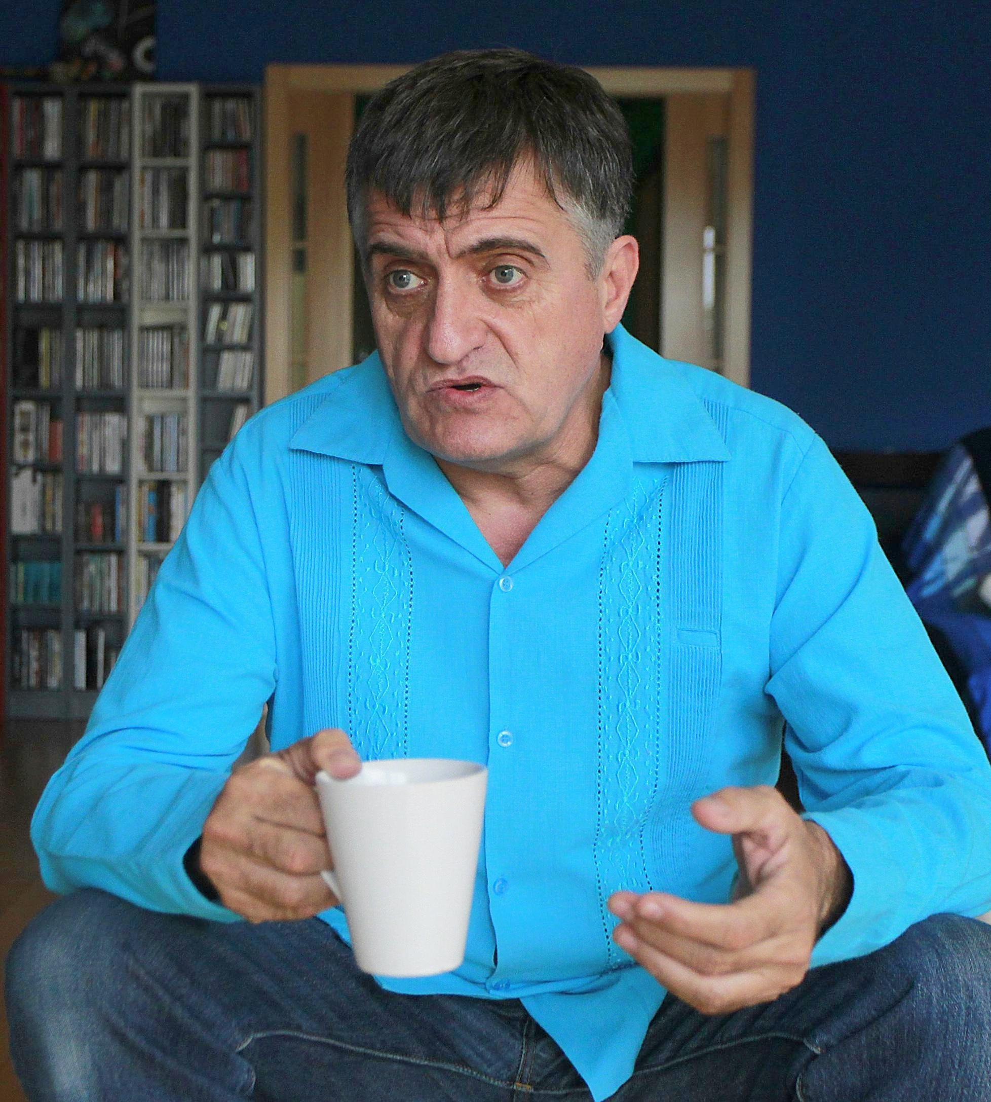 Presentamos un extracto del libro Palabras sabias a oídos sordos (Roca Editorial), de Antonio Contreras, que se presenta este martes a las 19:30 horas en la Casa del Lector, en Madrid. El libro incluye entrevistas con Ana Pastor, Jordi Évole, Antonio García Ferreras, El Gran Wyoming e Iñaki Gabilondo y está prologado por Fran Llorente